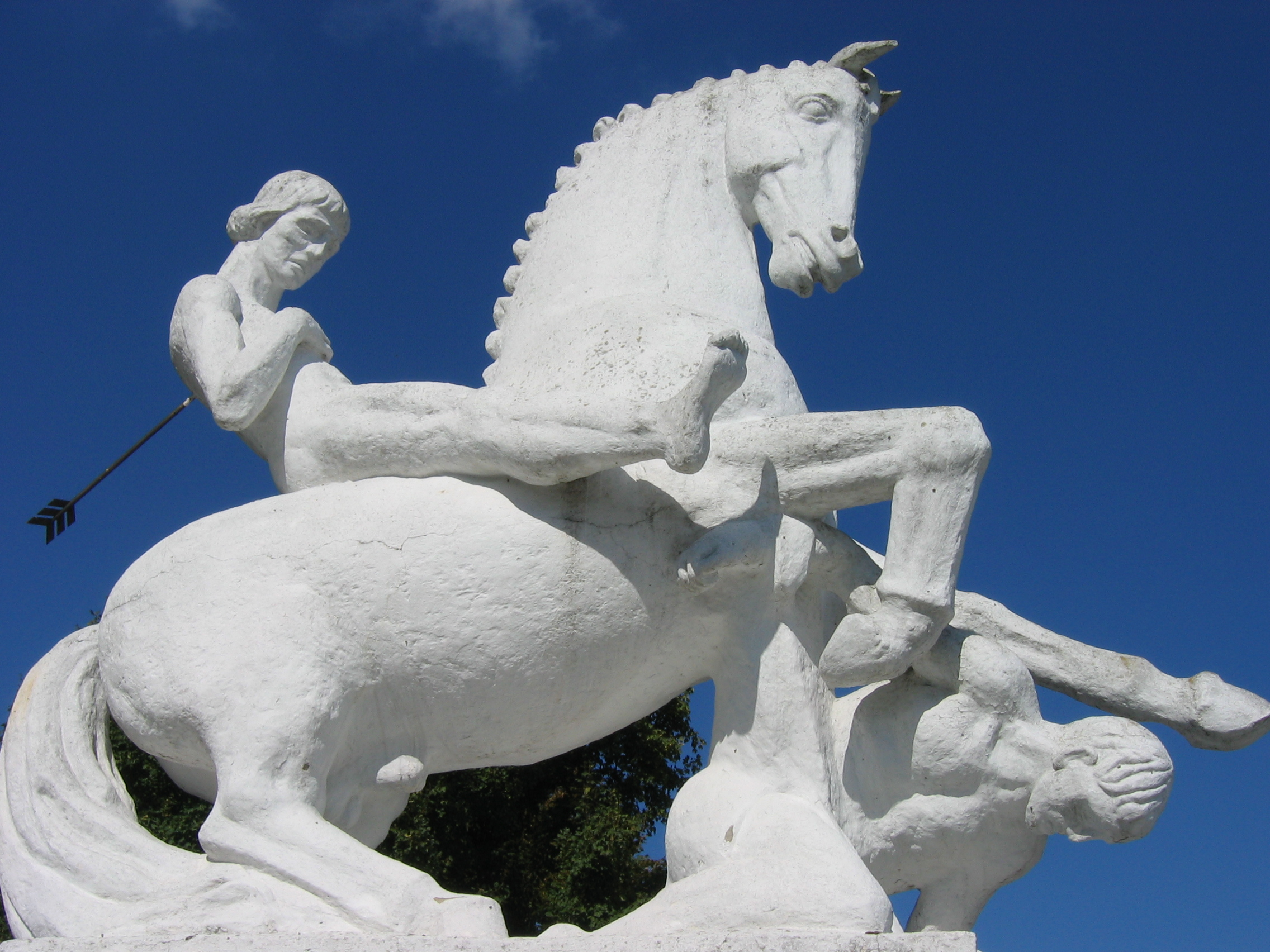 author User:Mathiasrex Maciej Szczepańczyk.